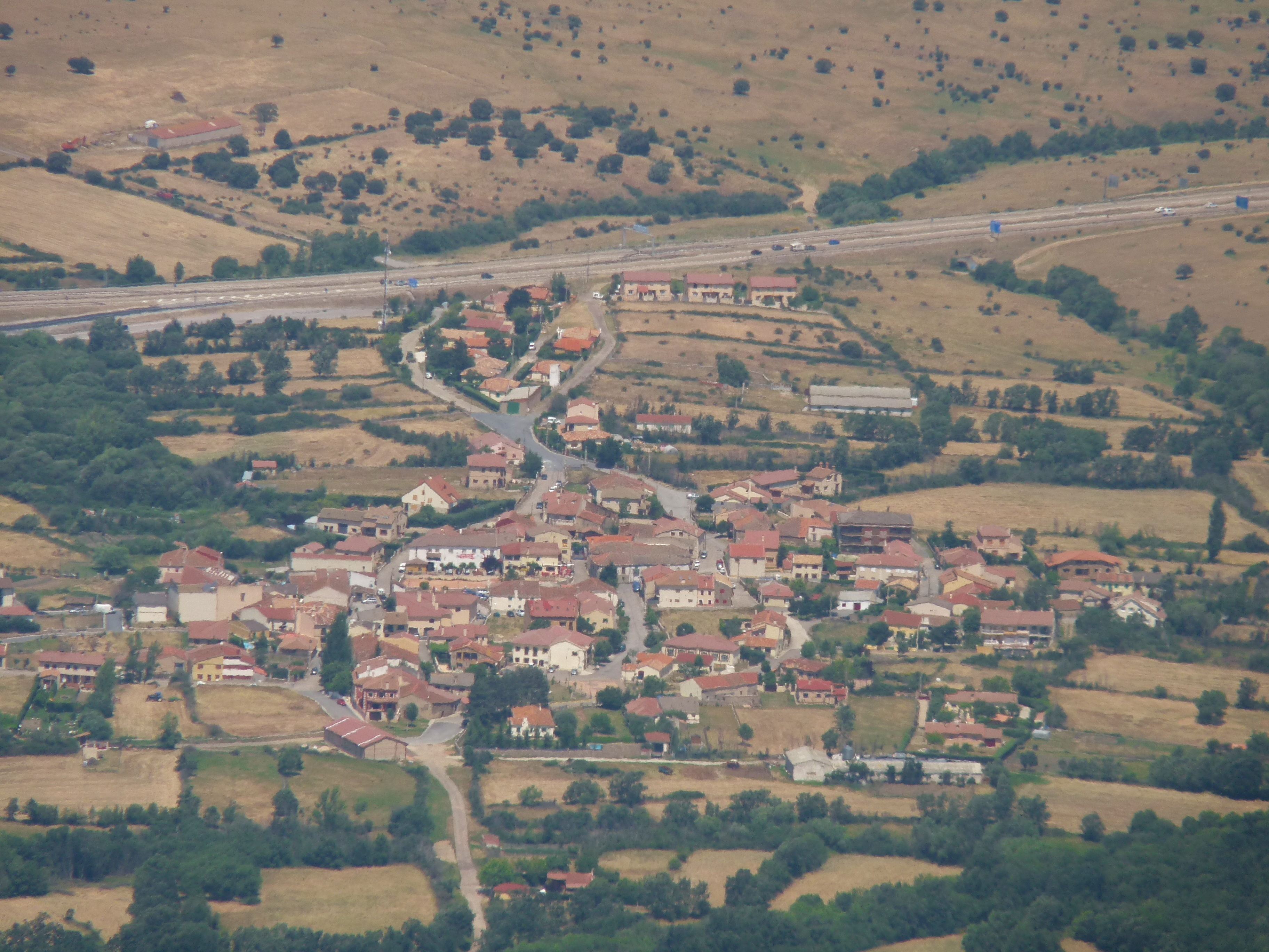 Vista de Santo Tomé del Puerto